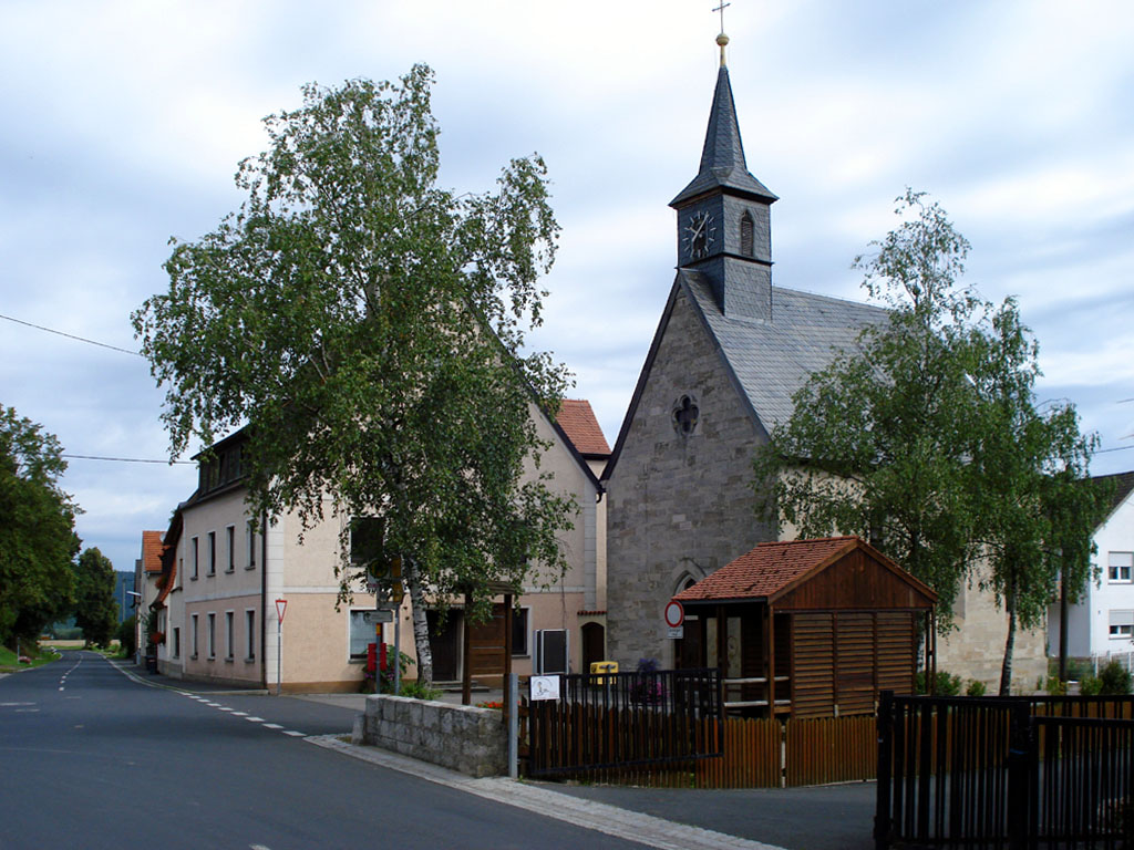 Dippach, Stadt Eltmann, Bayern